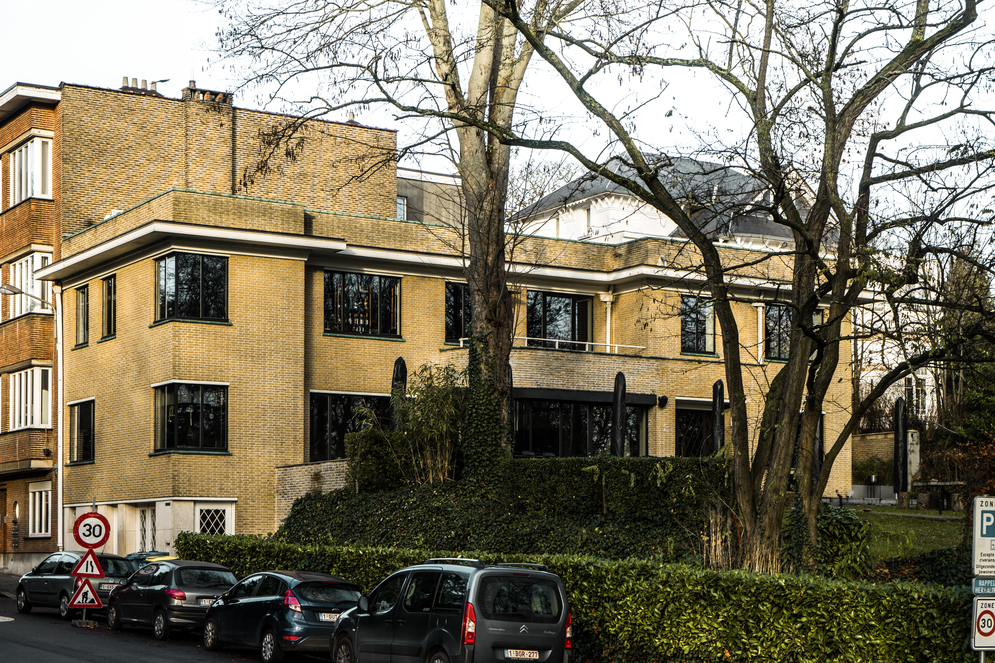 Villa au numéro 292 de l'avenue de Tervuren